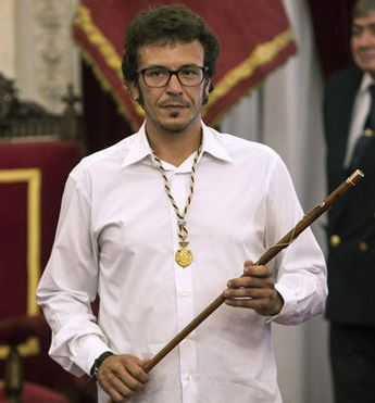 Jose Maria Gonzalez Santos